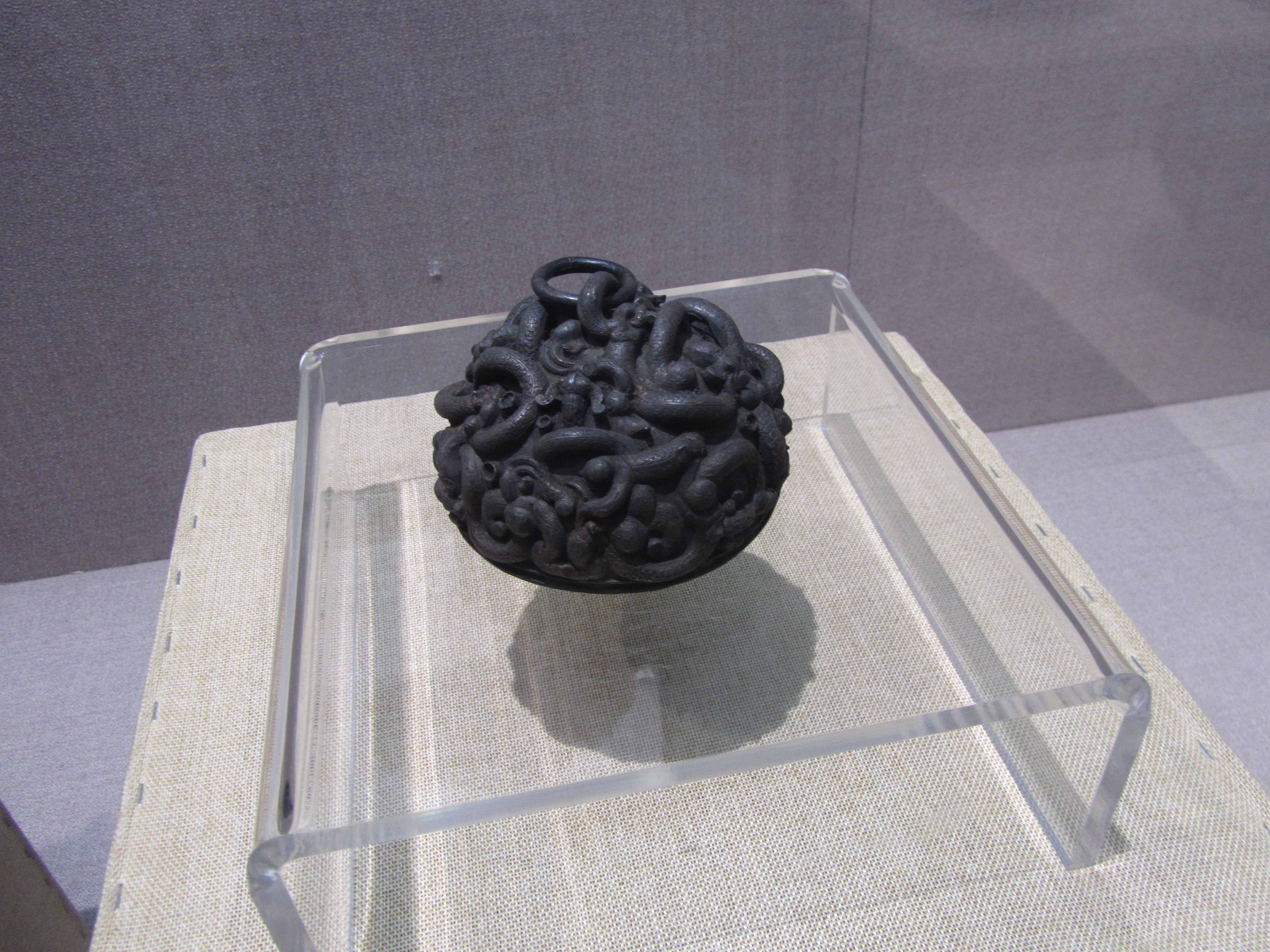 战国铜镇，绍兴博物馆藏。